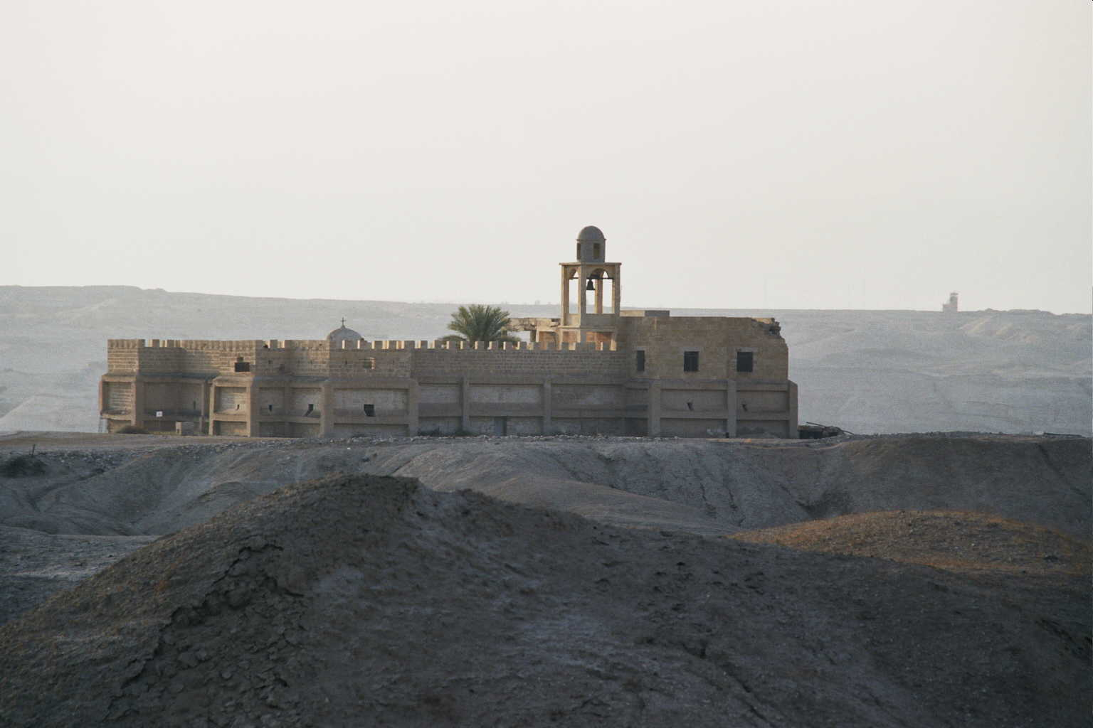 St. John Monastery, Kasser Al Yahud